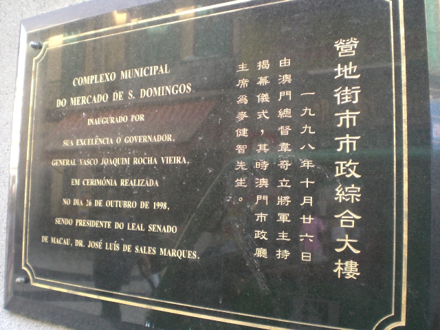 營地街市市政綜合大樓 Macau Complexo Municipal Do Mercado De S Domingos Photo author= Mo707